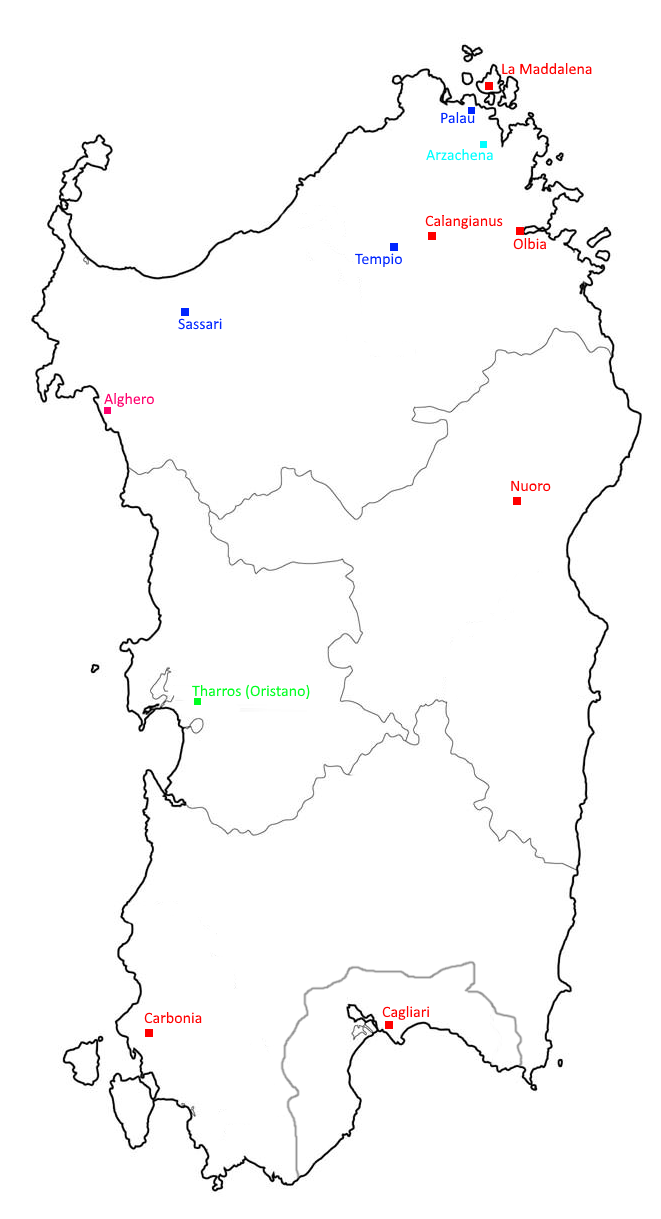 Le principali fazioni ultras in sardegna